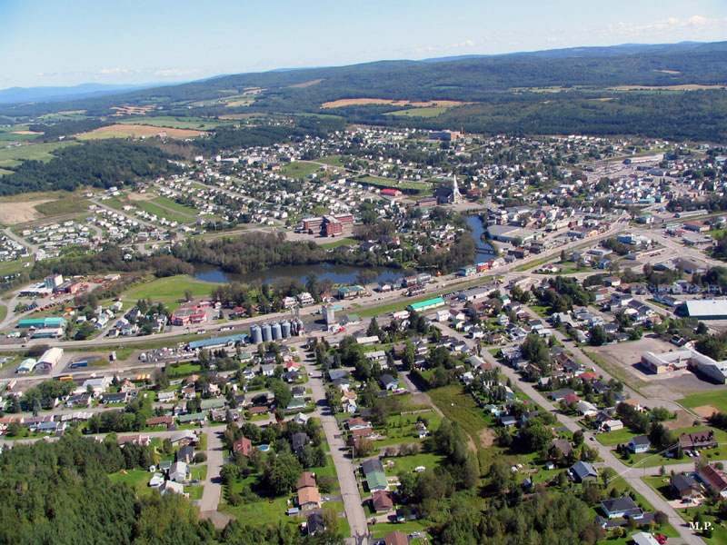 Vue aérienne de la ville d'Amqui, dans la région du Bas-Saint-Laurent, au Québec.